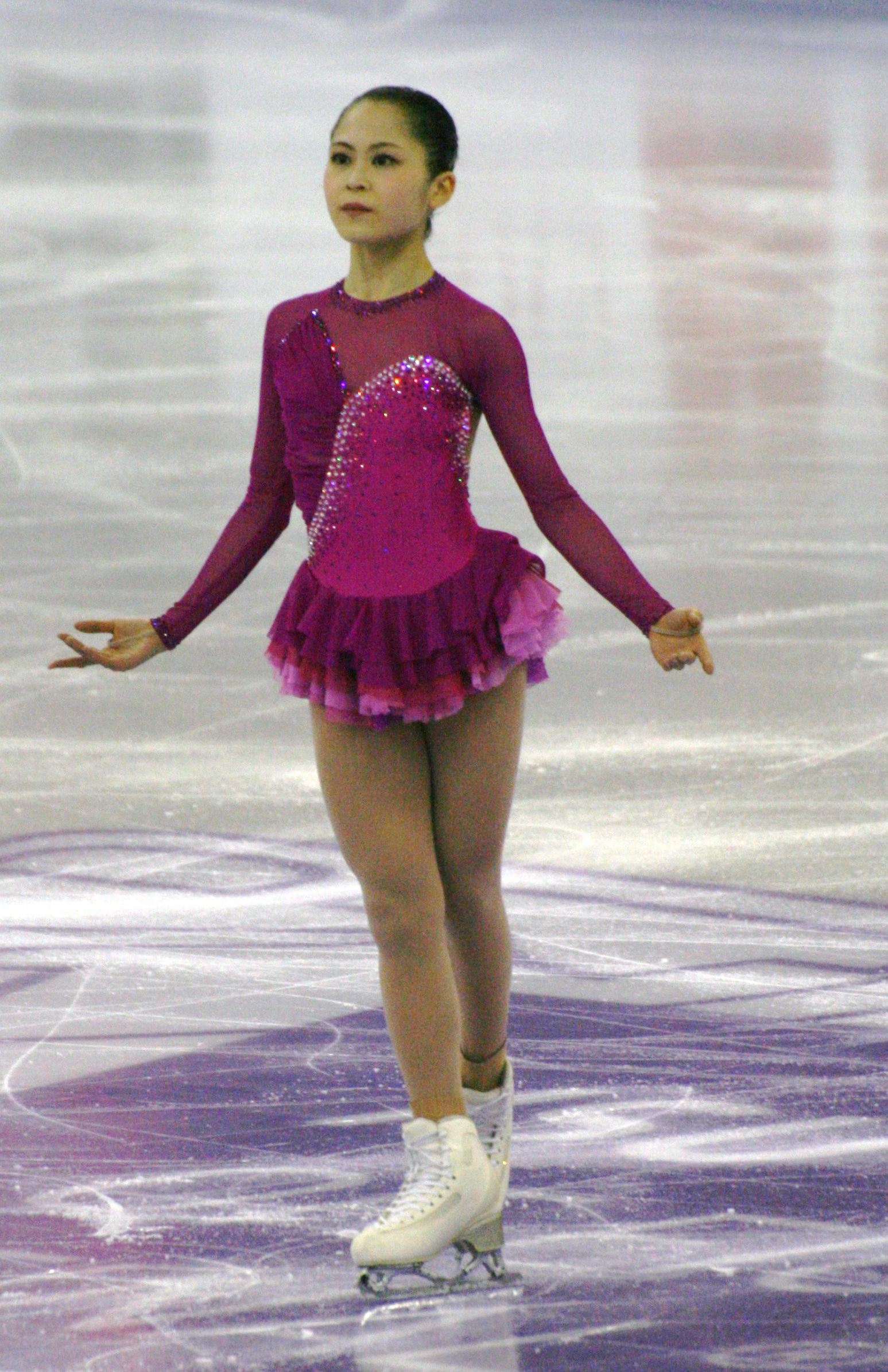 Сатоко Мияхара (Япония) на финале Гран-при по фигурному катанию 2015-2016.